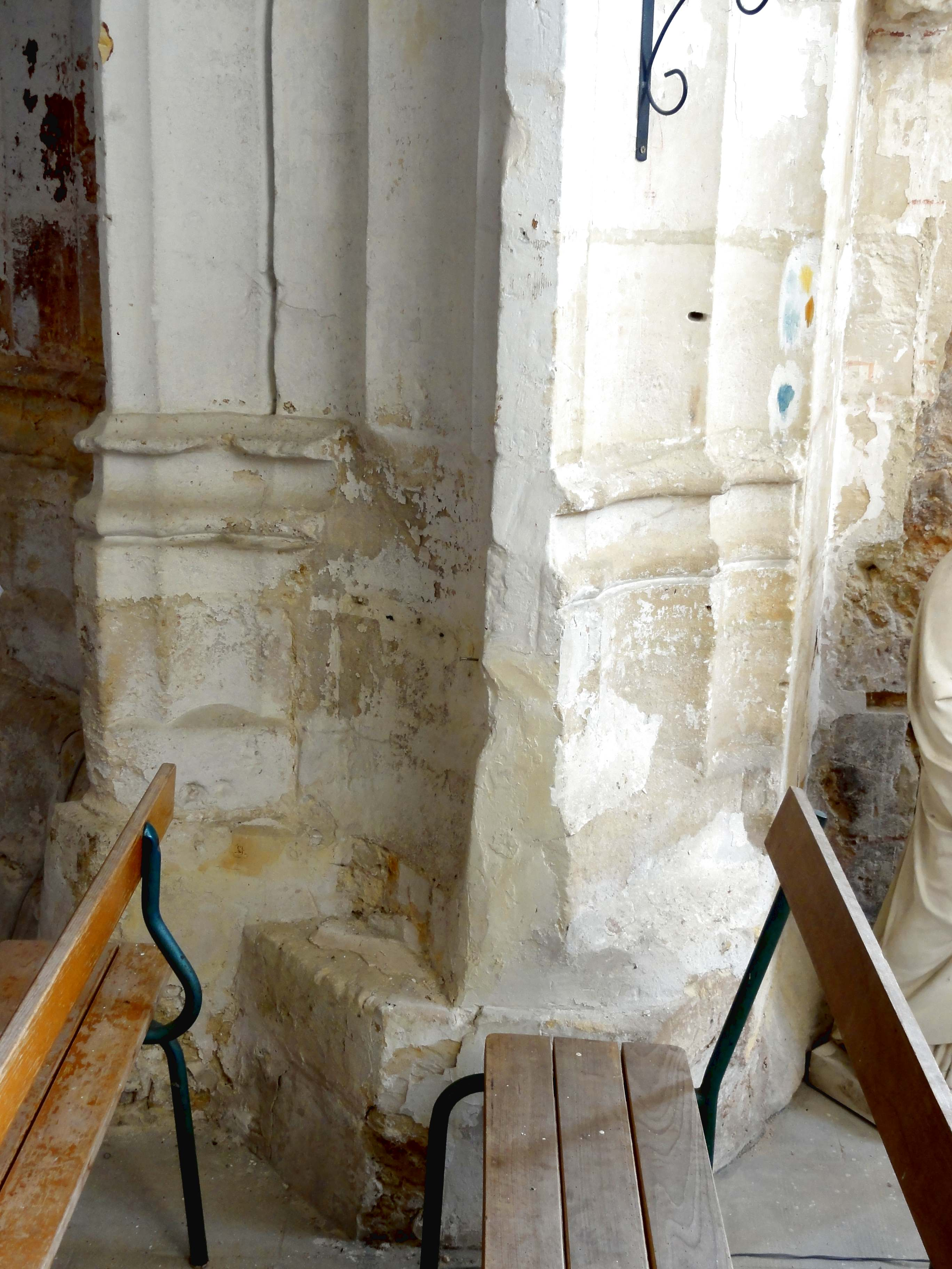 Intérieur de l'église - voir de l'église.